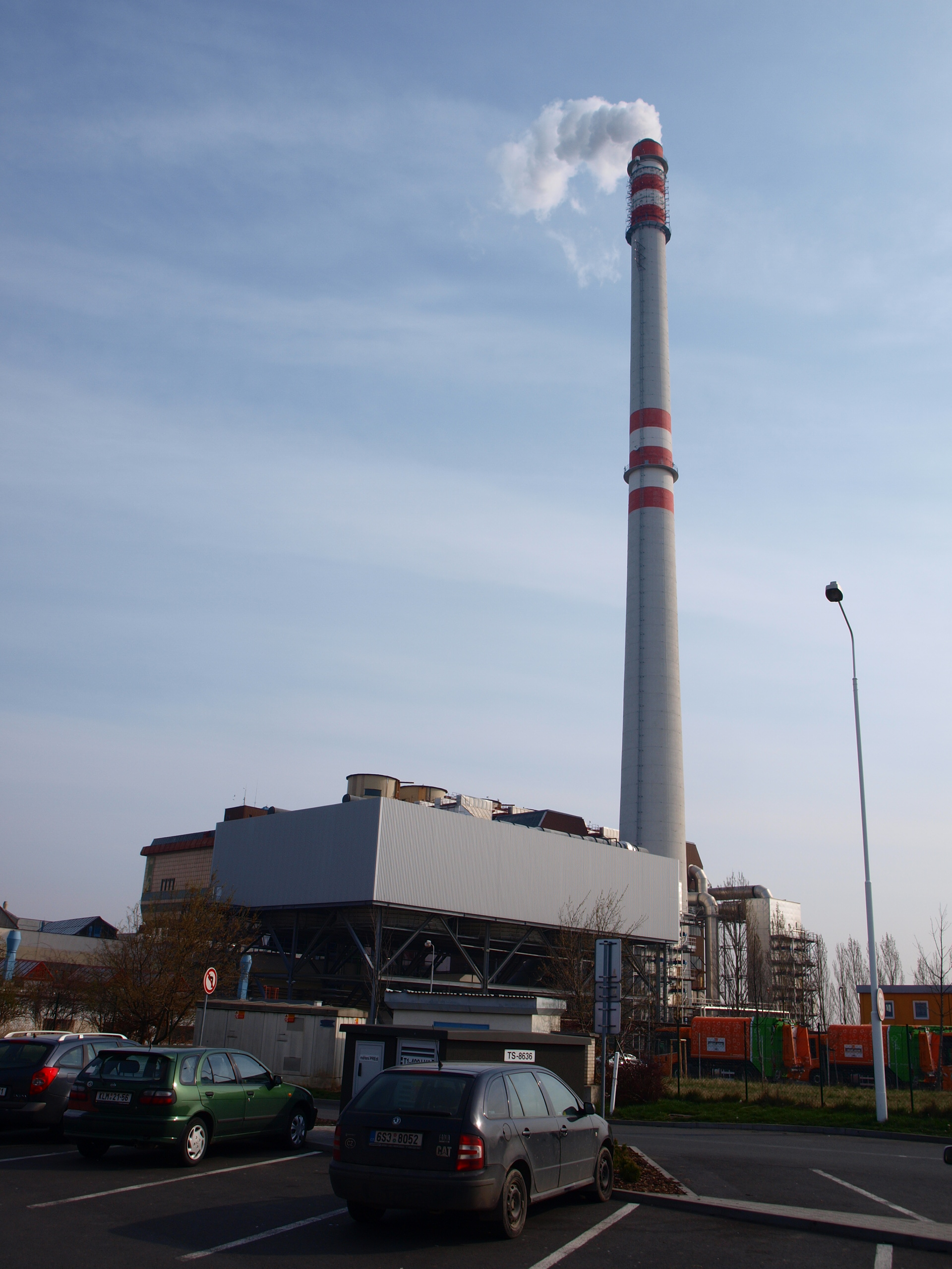 Spalovna Malešice